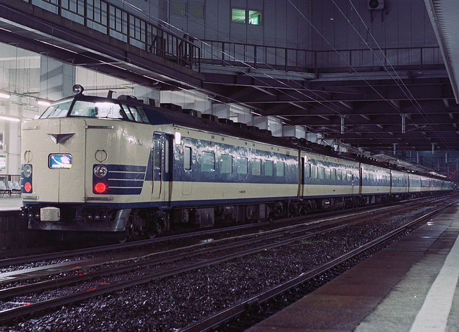 国鉄 583系特急形電車 エキスポドリーム